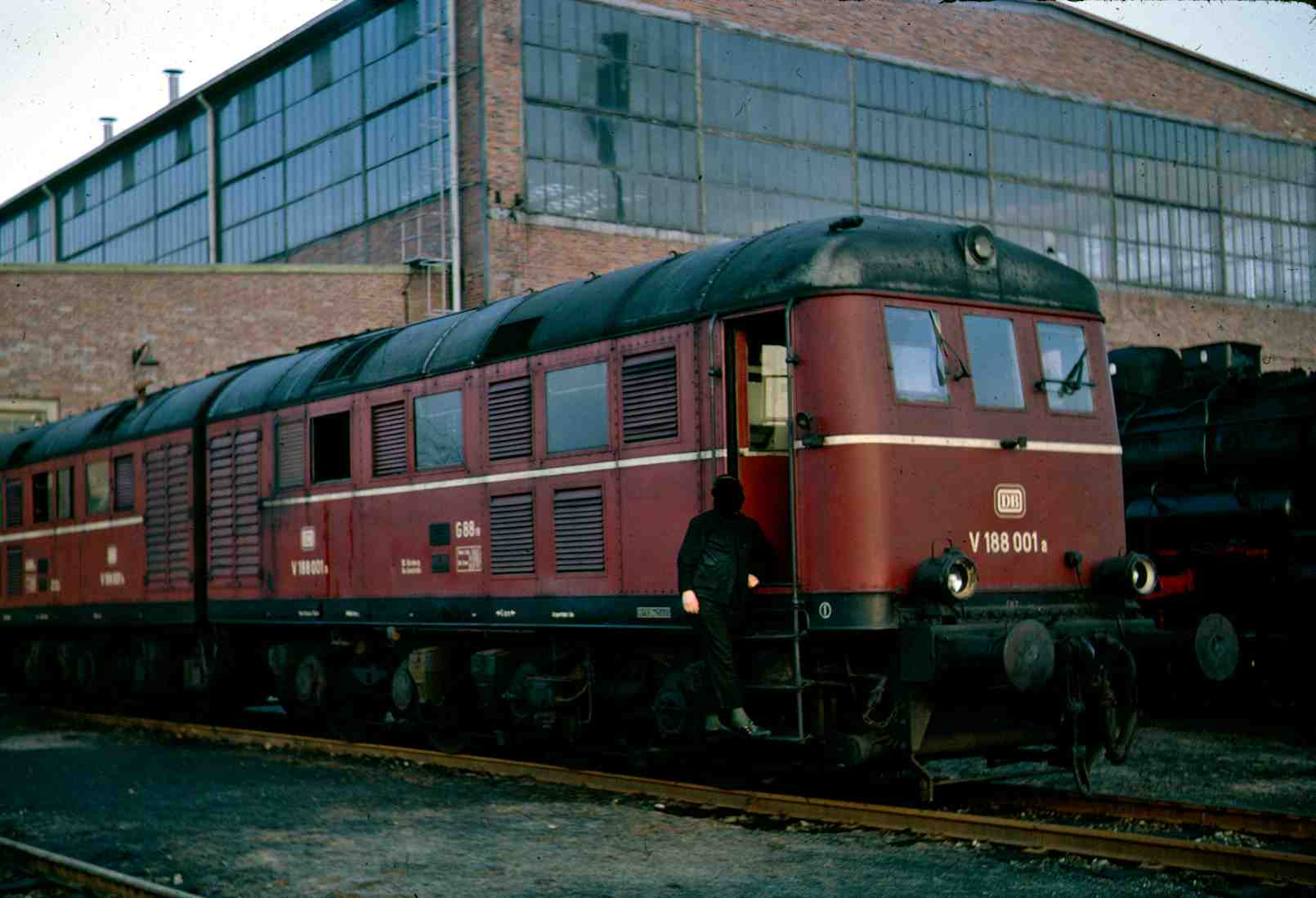 V188 001 im AW Nürnberg